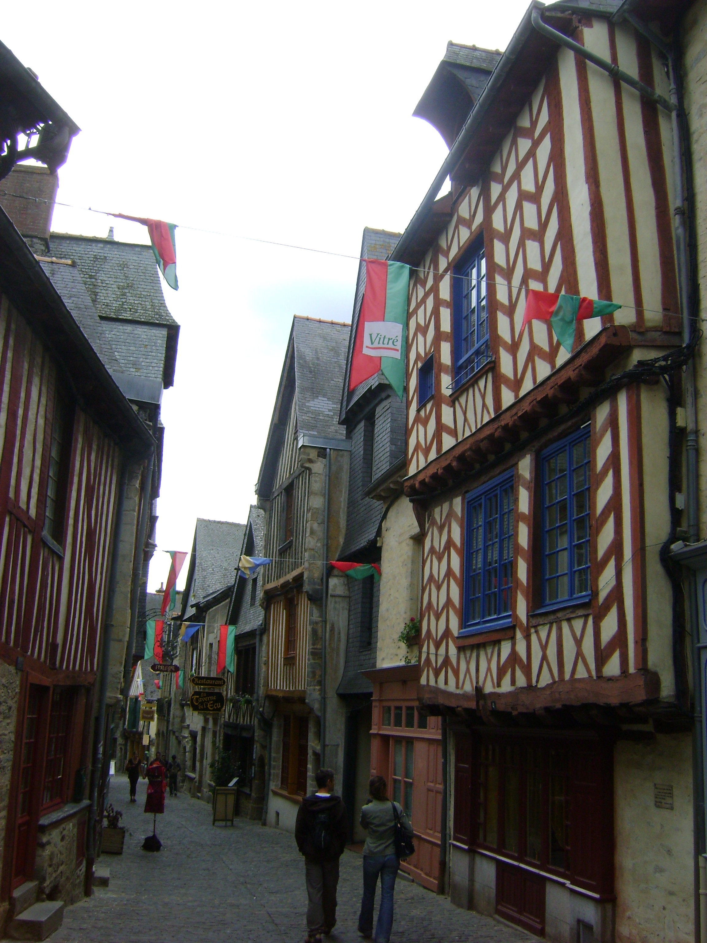 Maisons situées au niveau du 5 rue Baudrairie à Vitré, Ille-et-Vilaine. .